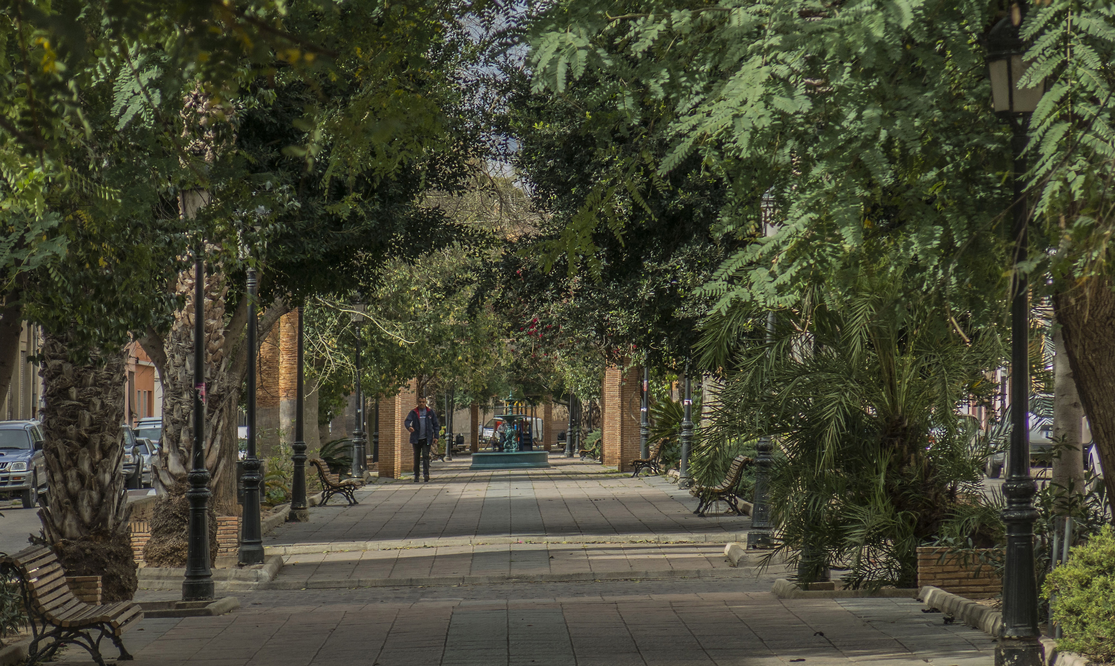 Albalat de la Ribera és un municipi del País Valencià, situat a la comarca de la Ribera Baixa. Imatge editada en: Guía Repsol, Albalat de la Ribera